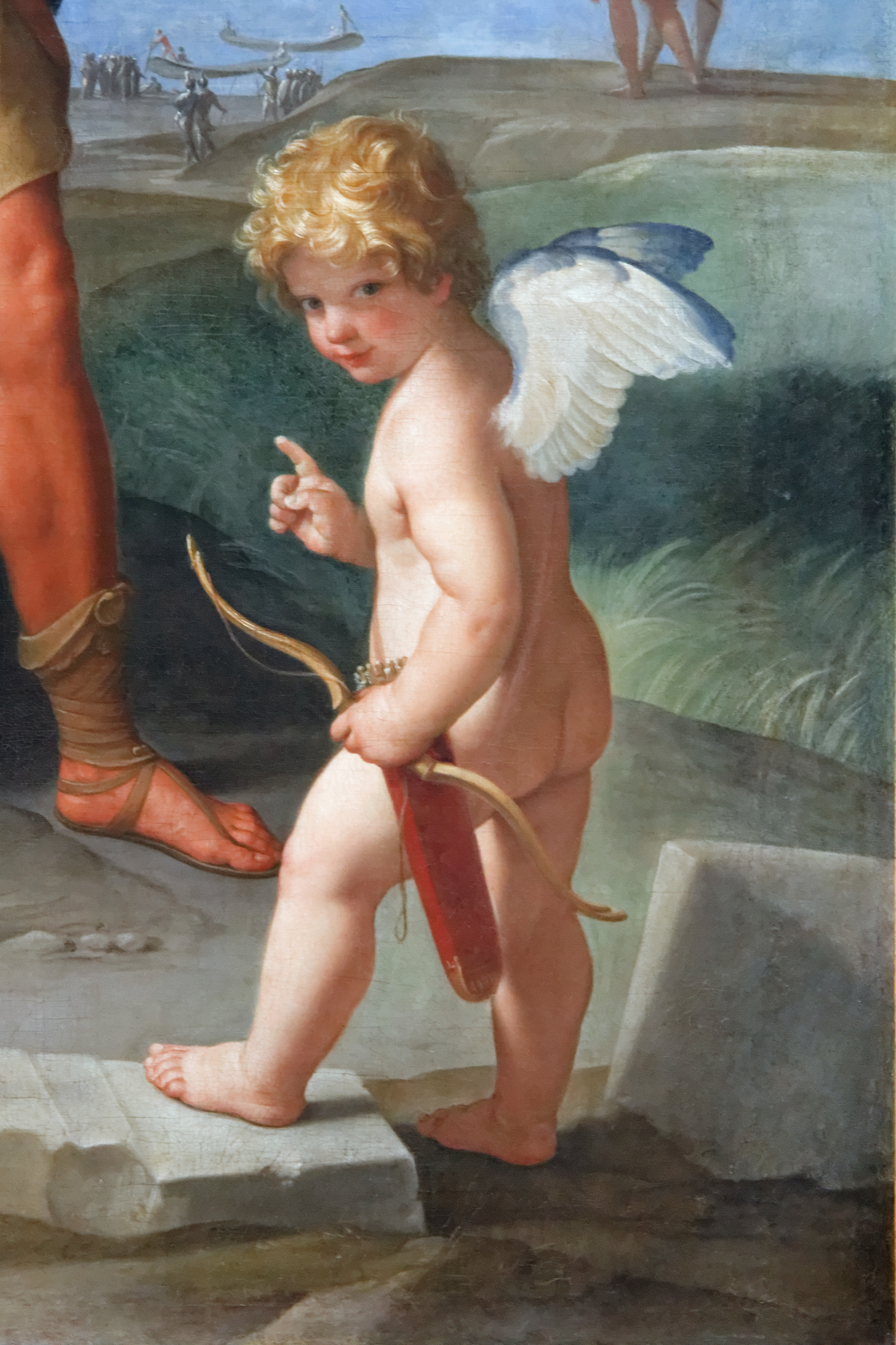 Éros